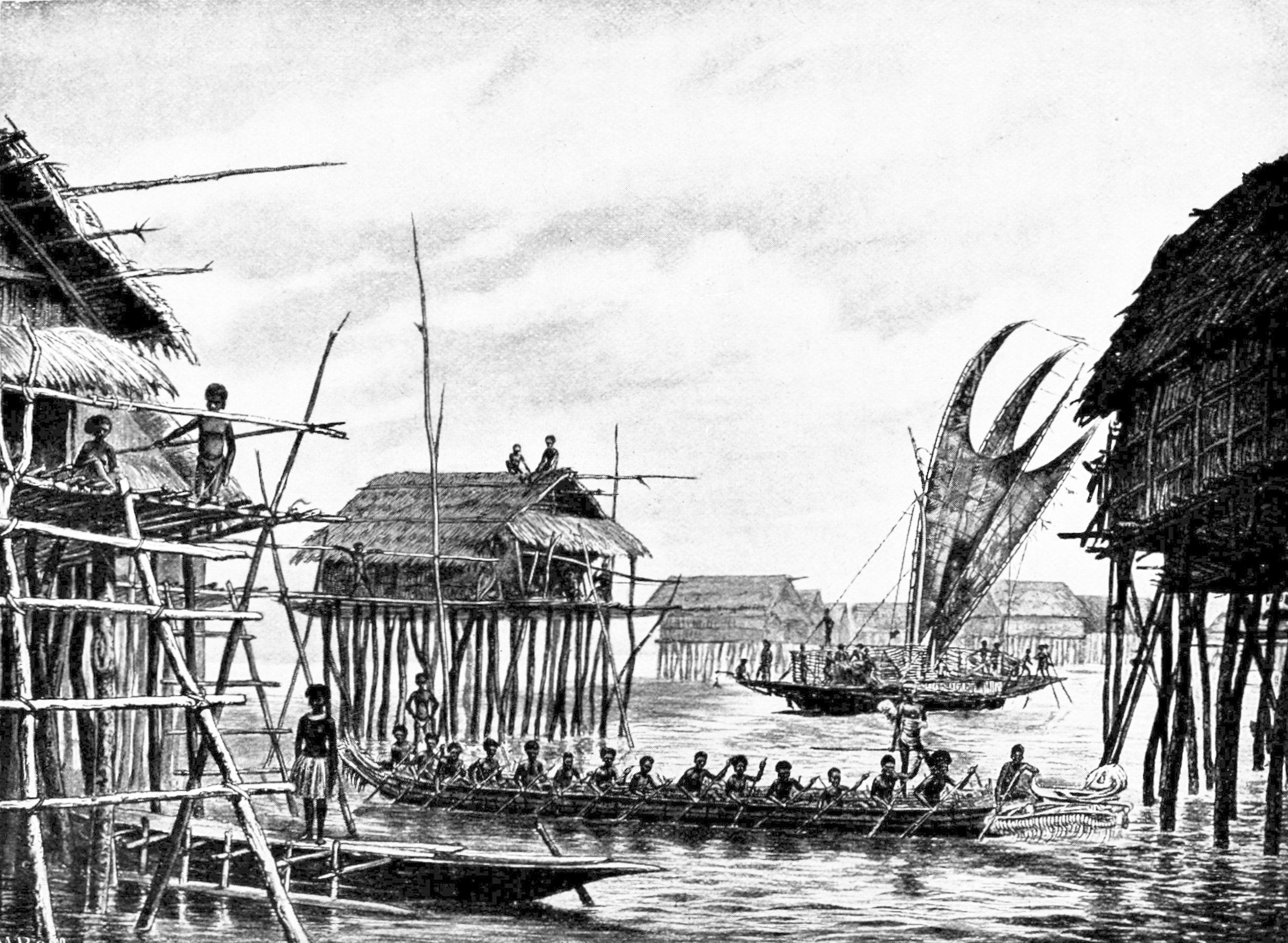 Papuan lake dwellings with a lakatoi under sail